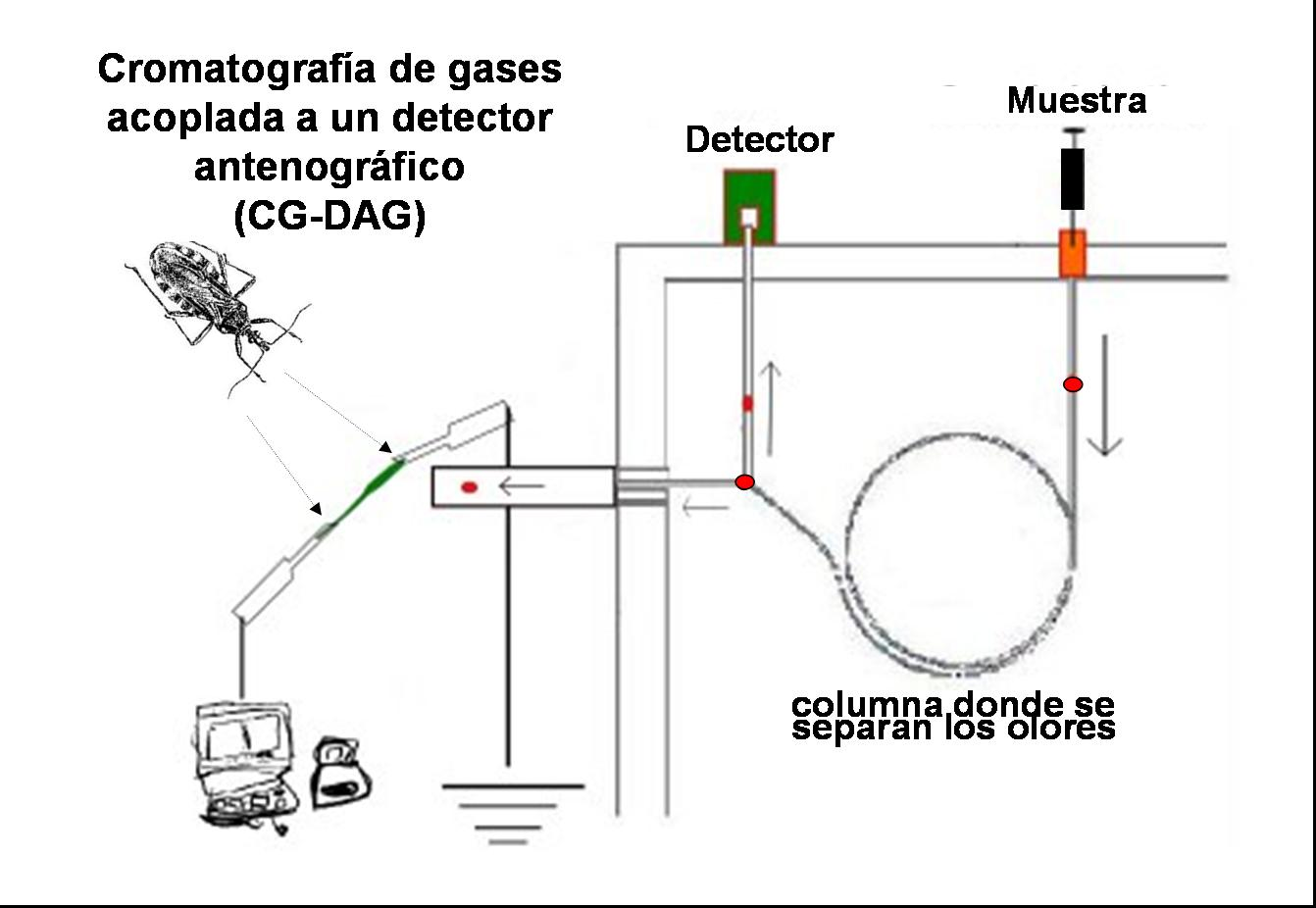 CG-DAG (GC-EAD)